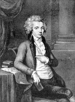 Pavel Martynovitch Skavronskiy/ Павел Мартынович Скавронский